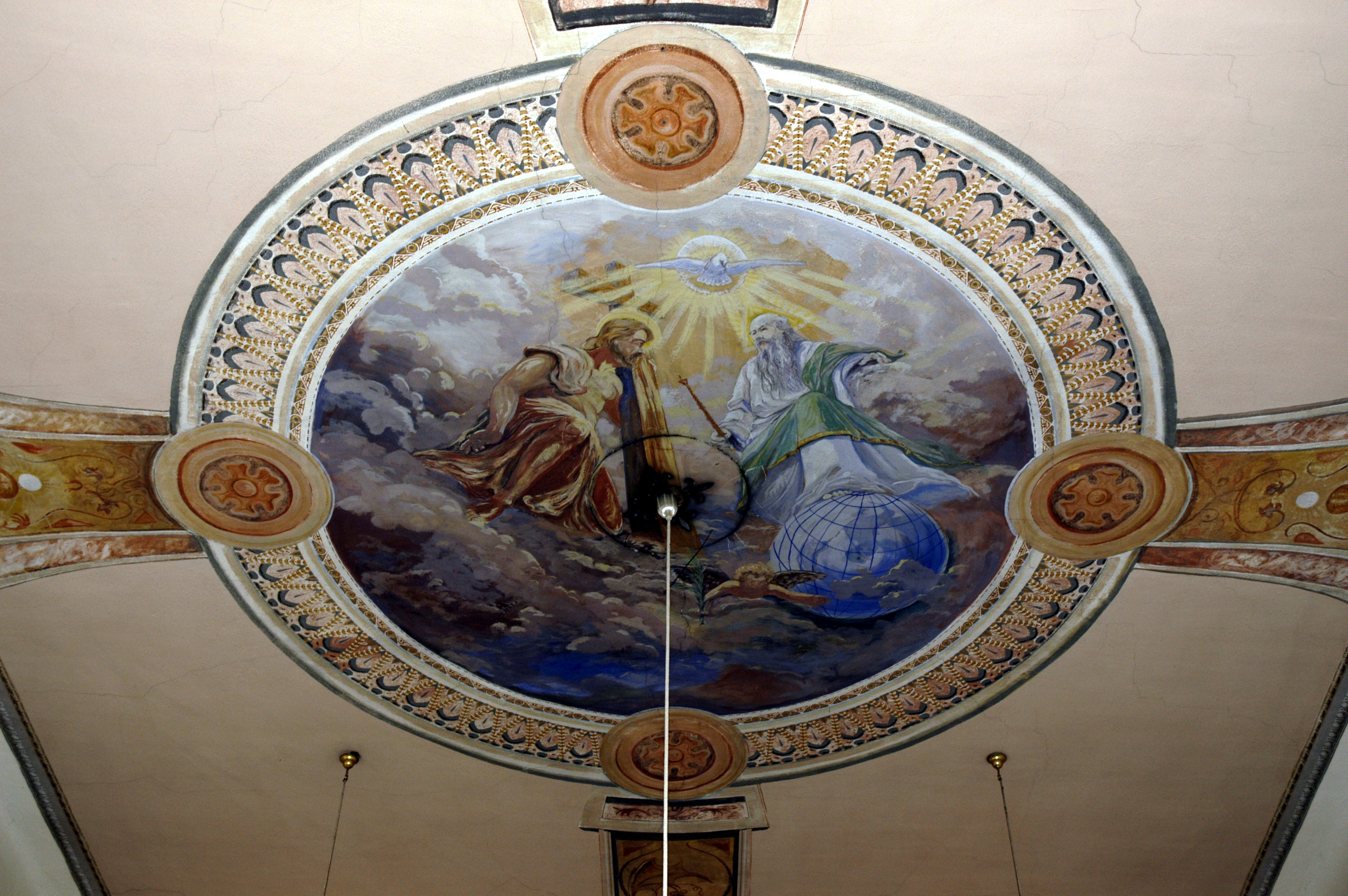 Kath. Pfarrkirche hl. Leopold in Stoitzendorf Langhausdecke